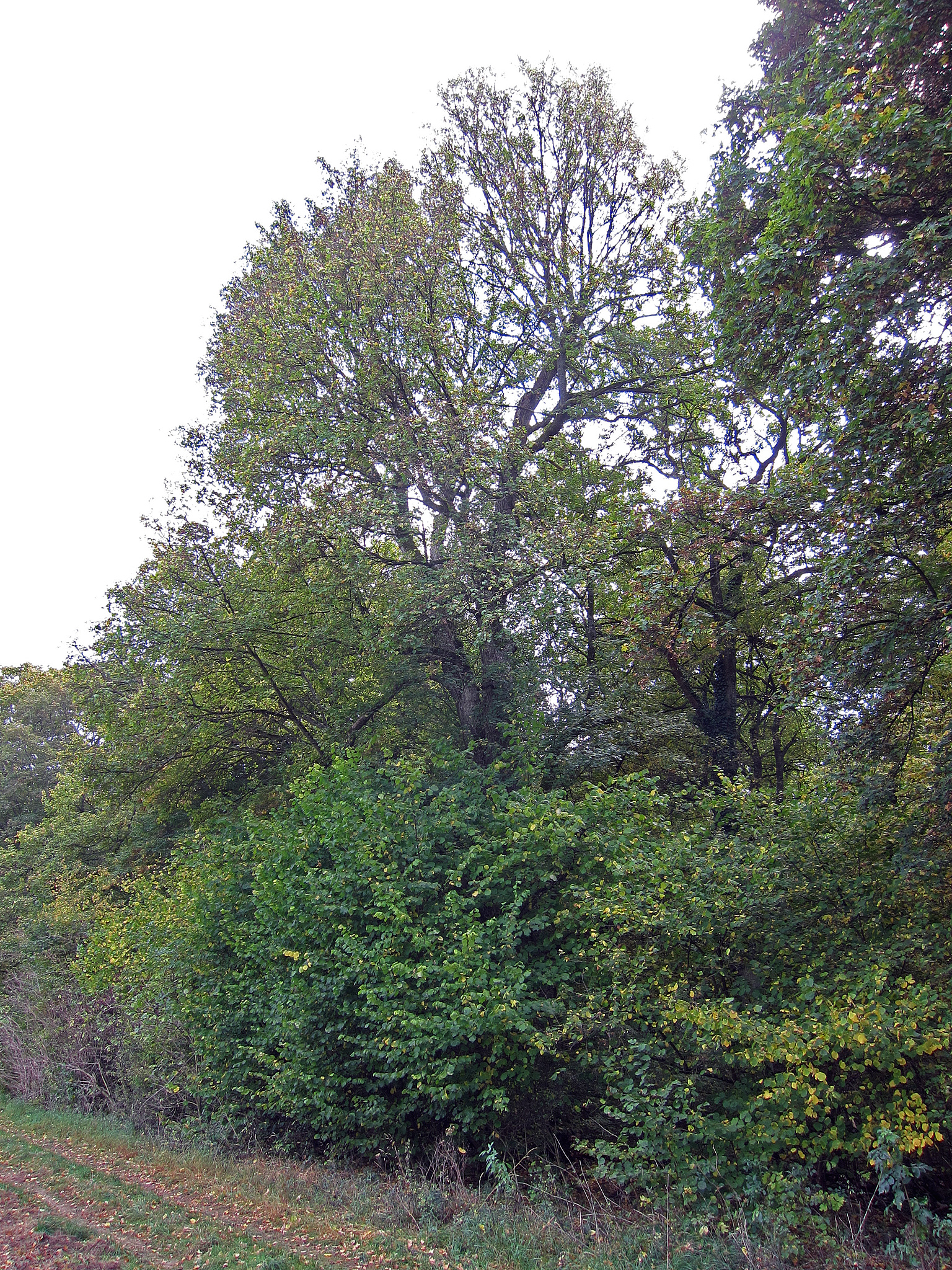 Ahorn Karbach